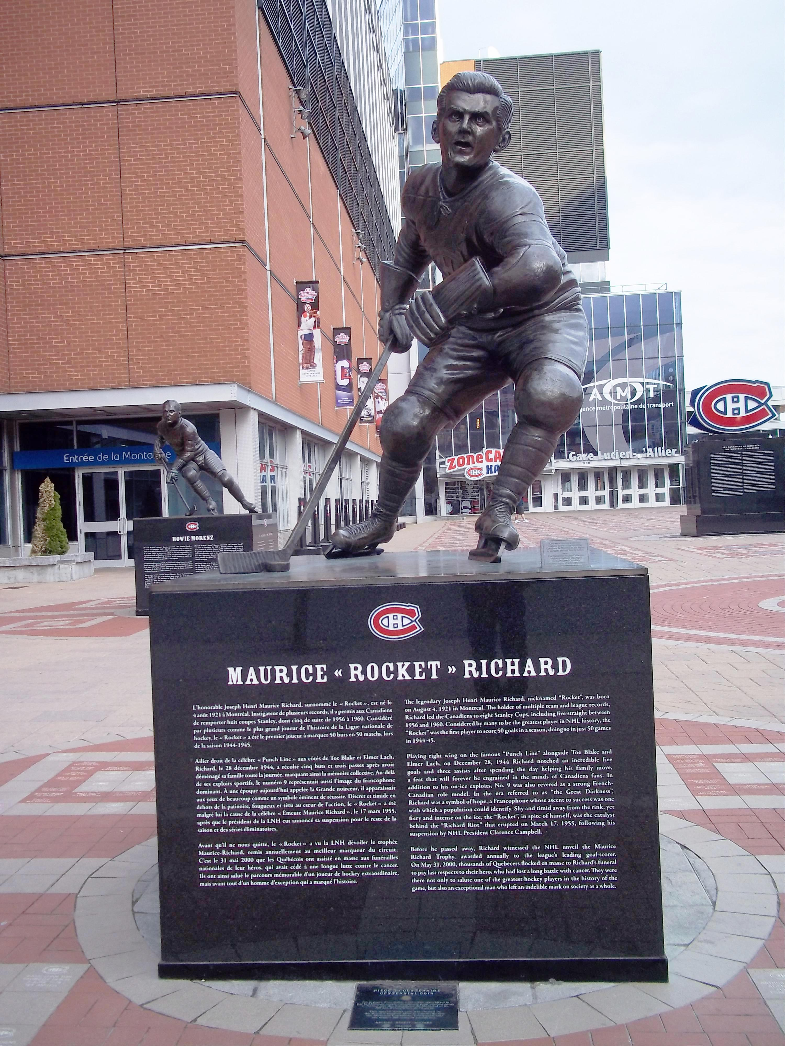 Statue de Maurice Richard, Centre Bell, Montréal